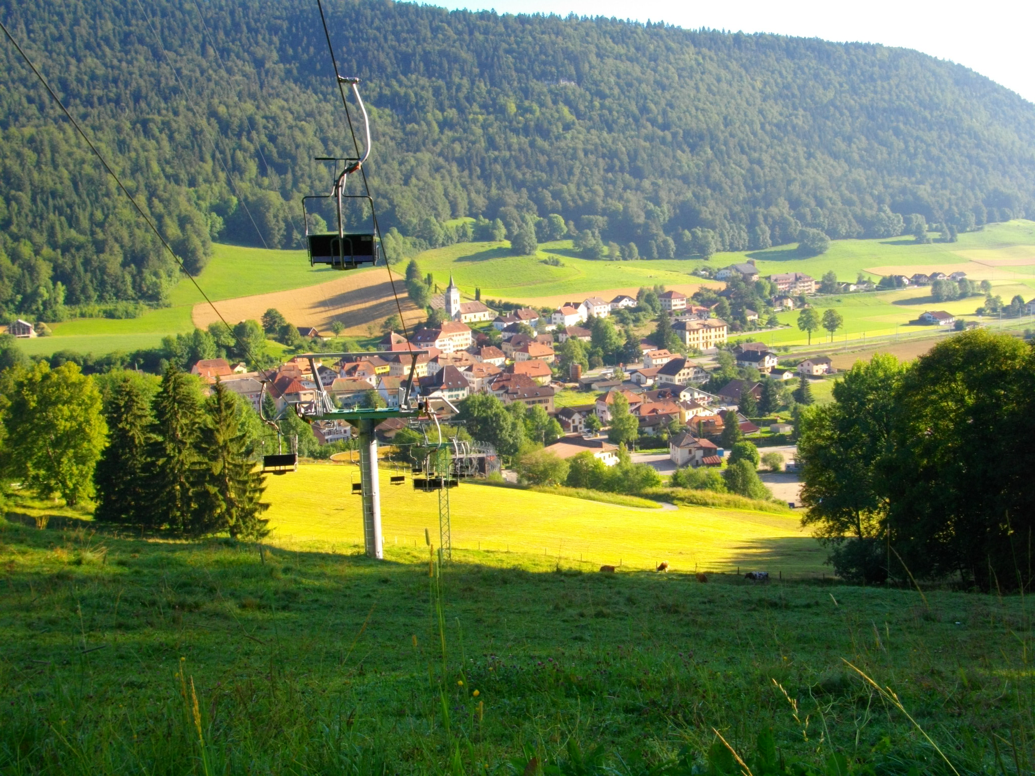 Vue du village de Buttes